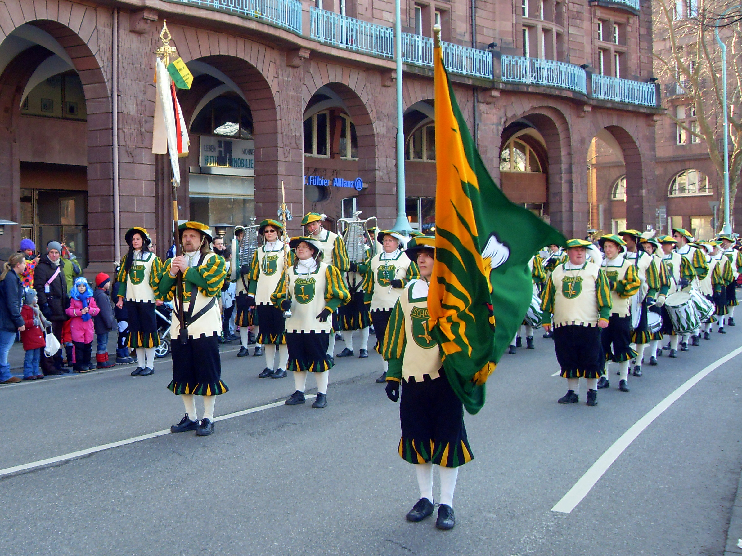 Mannheim Ahoj 2013